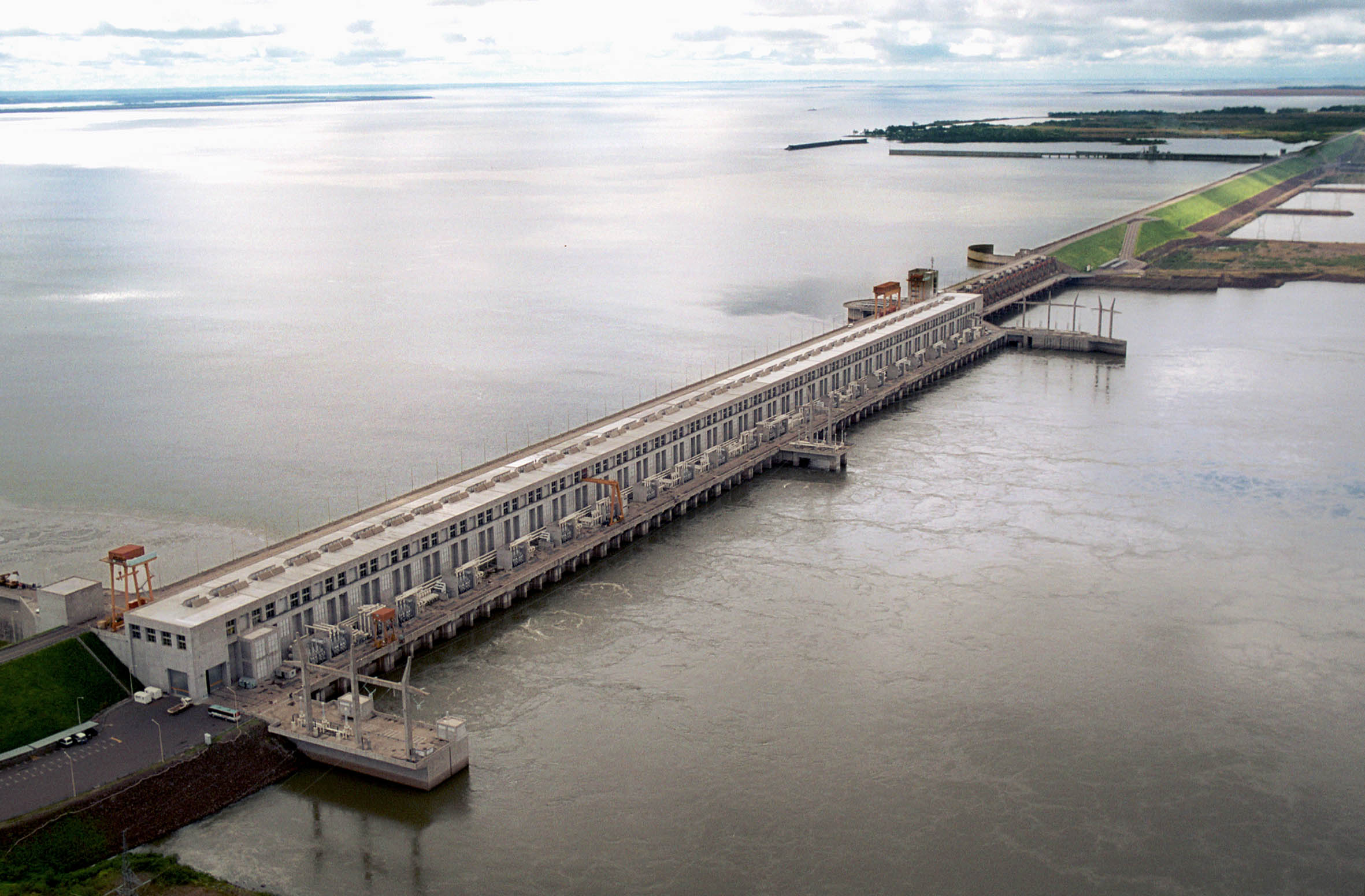 Vista externa desde el margen derecho de la central Hidroeléctrica Yacyretá, sobre el río Paraná